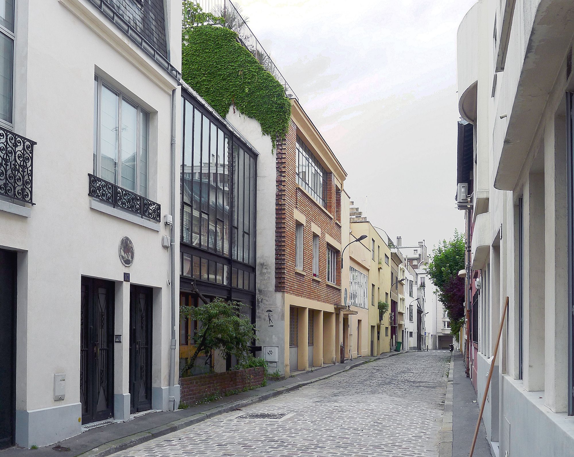 Villa Seurat - Paris XIV. Conçue comme une cité d'artistes, cette voie regroupe plusieurs ateliers ou hôtels particuliers construits de 1924 à 1926 pour différents artistes.